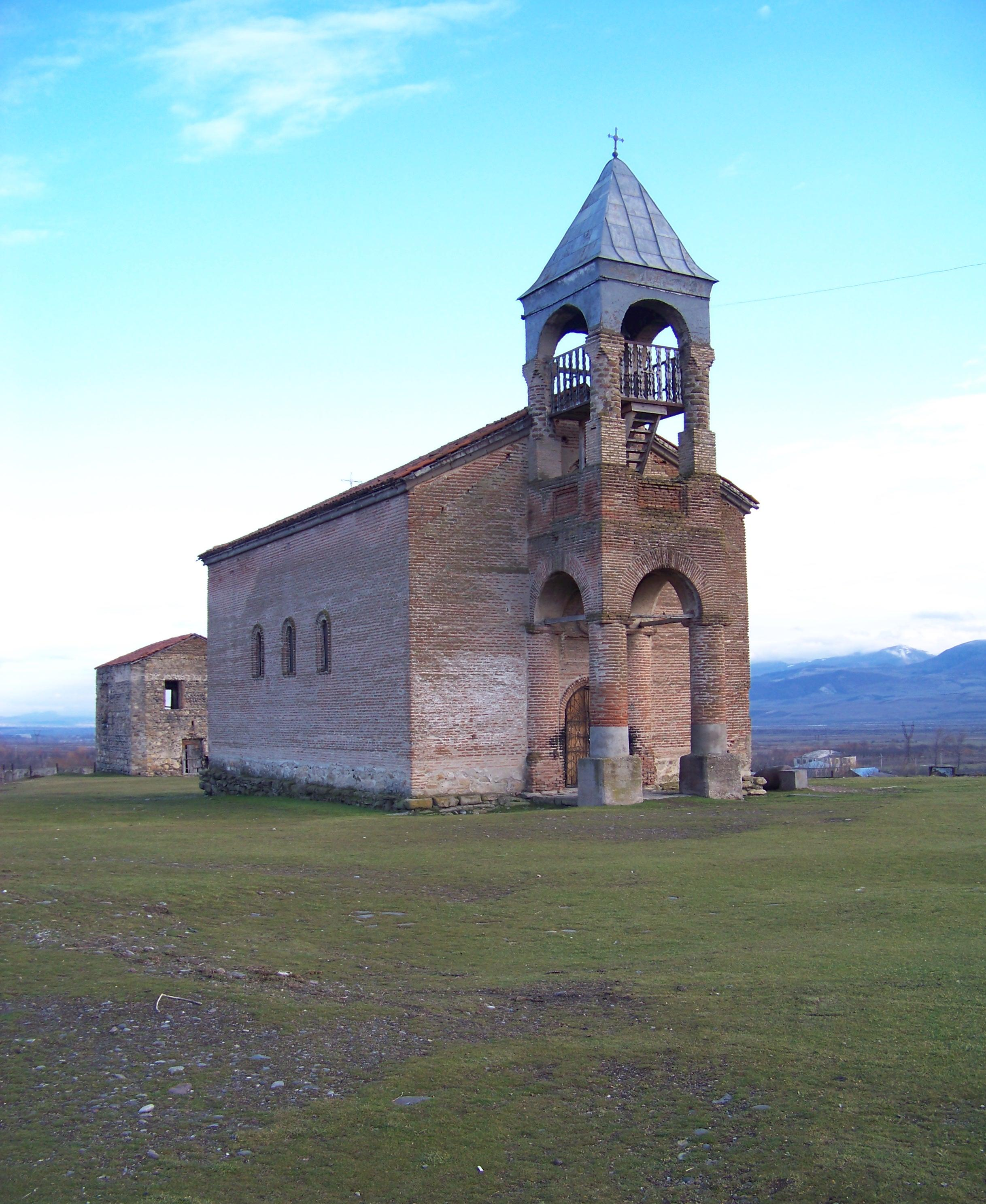 მოხისის წმინდა გიორგის ეკლესია